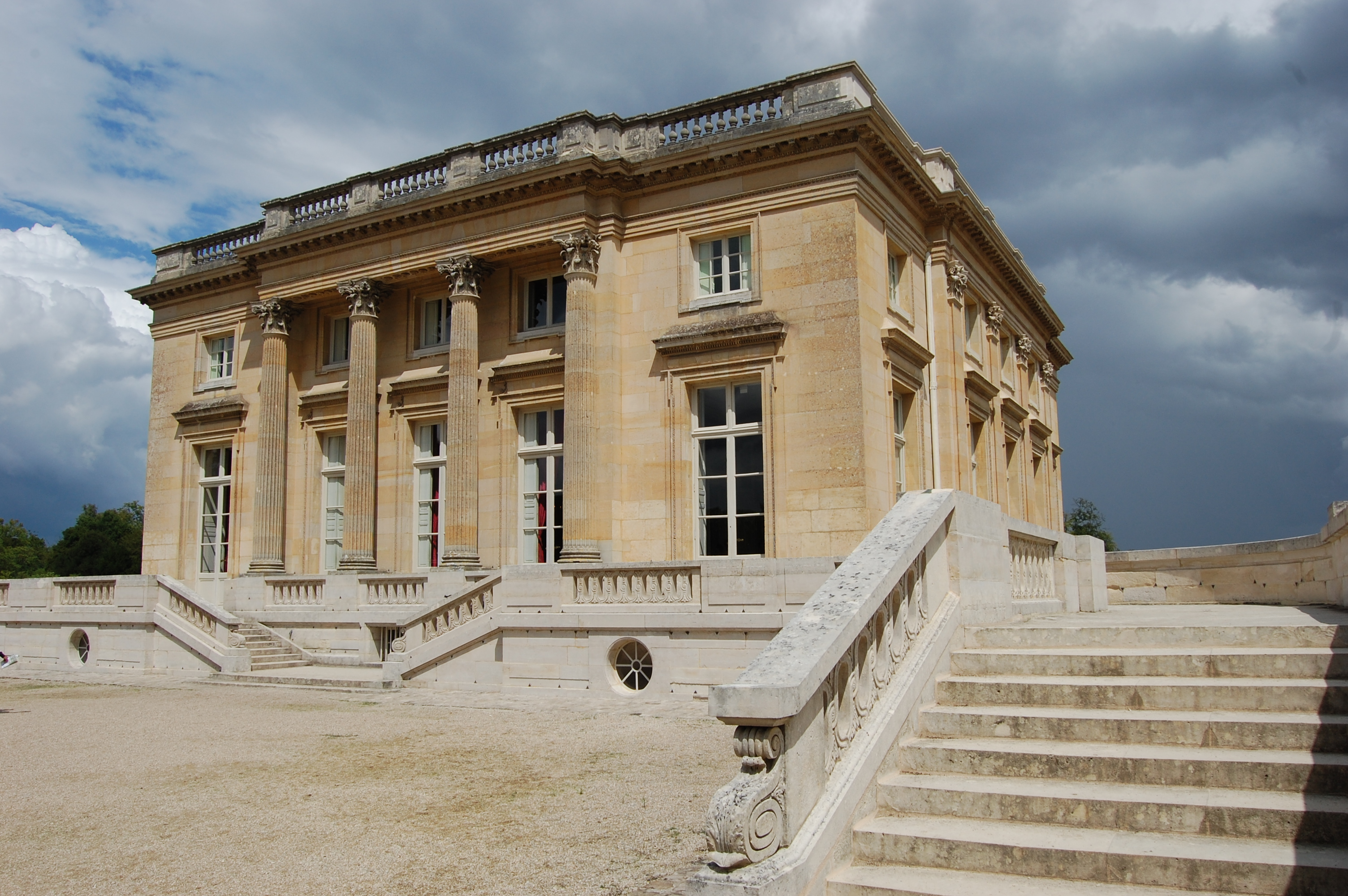 Petit Trianon, façades sud et ouest